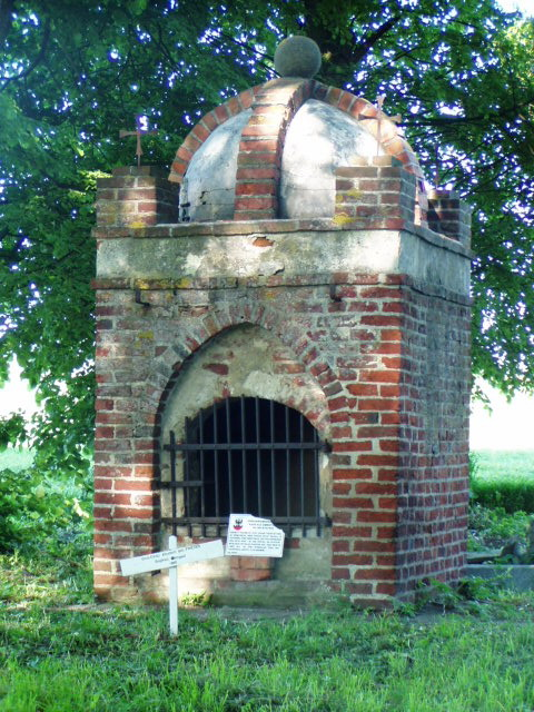 Bystrze - gotycka kaplica cmentarna z pierwszej połowy XIV w. zbudowana w celu złożenia kości poległych w wojnie trzynastoletniej. Kaplica murowana z czerwonej cegły na zaprawie wapiennej, zwieńczona półkolistą kopułą z czterema ceglanymi żebrami oraz kulą.